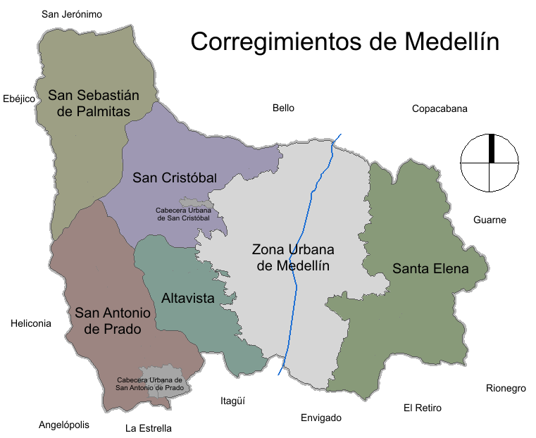 mapa de los Corregimientos de Medellín, Colombia.